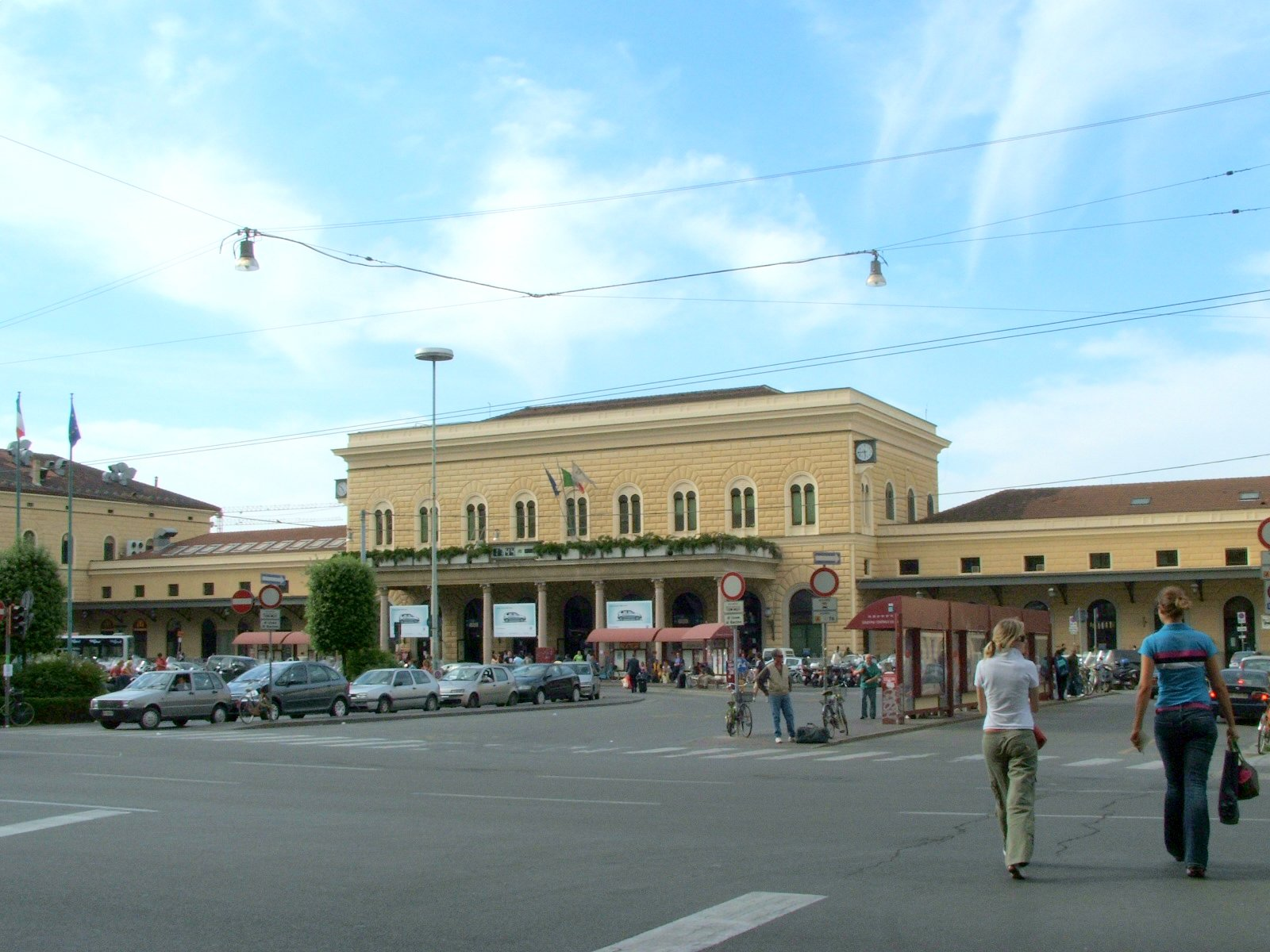 Bahnhof Bologna Centrale